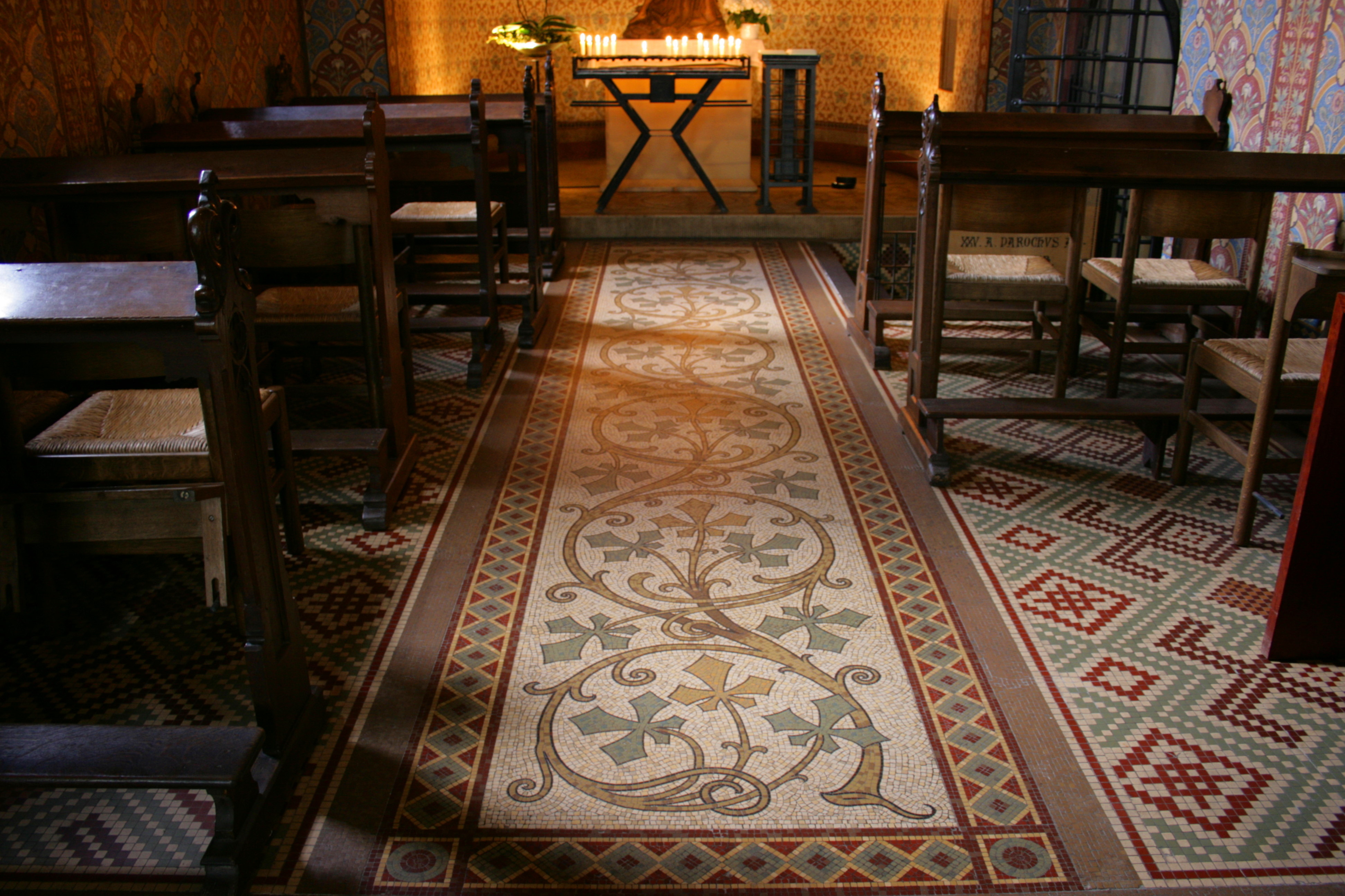 Sankt Martini in Emmerich am Rhein